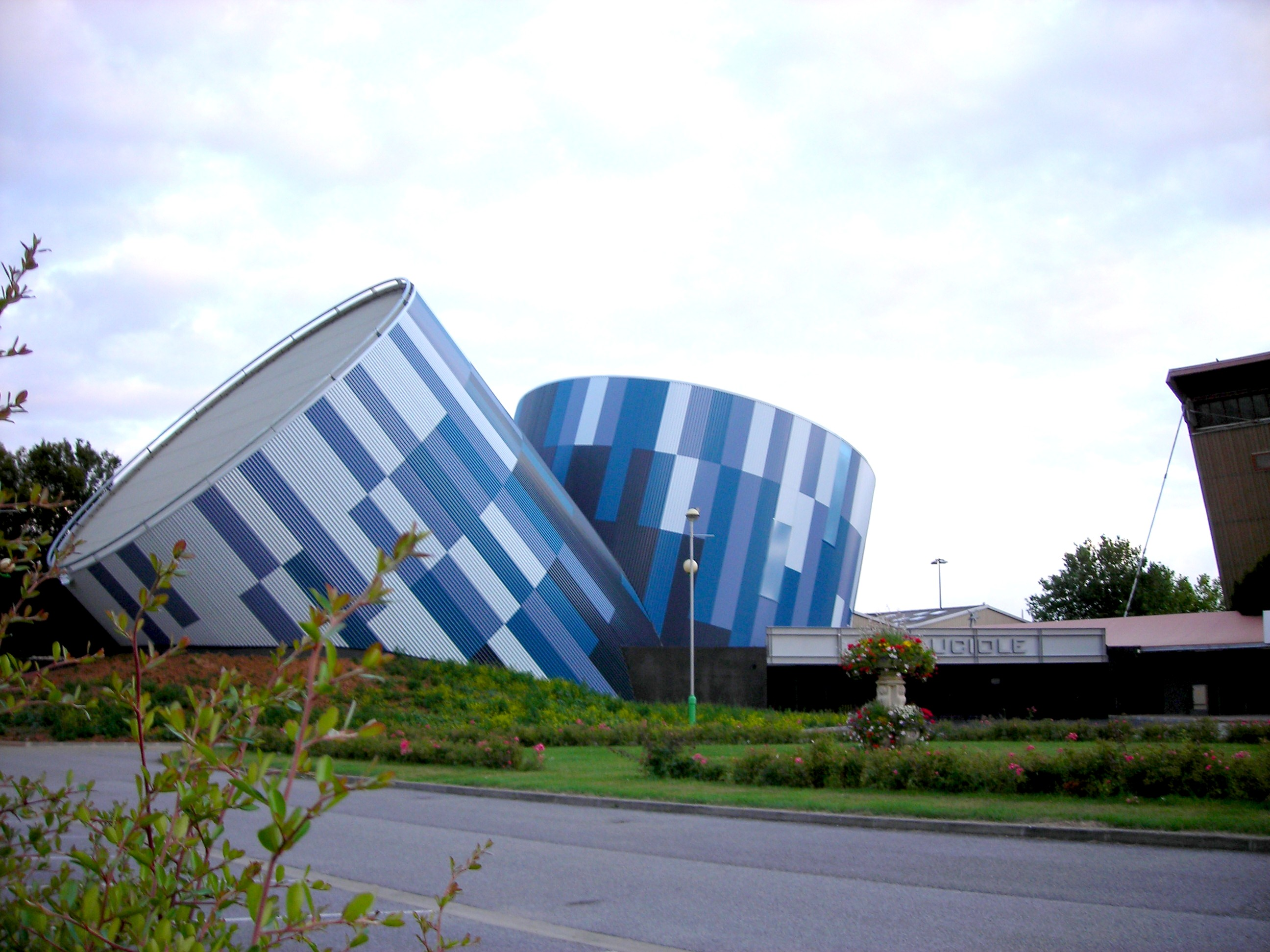 Vue extérieure de la Luciole (Alençon, Orne, France)